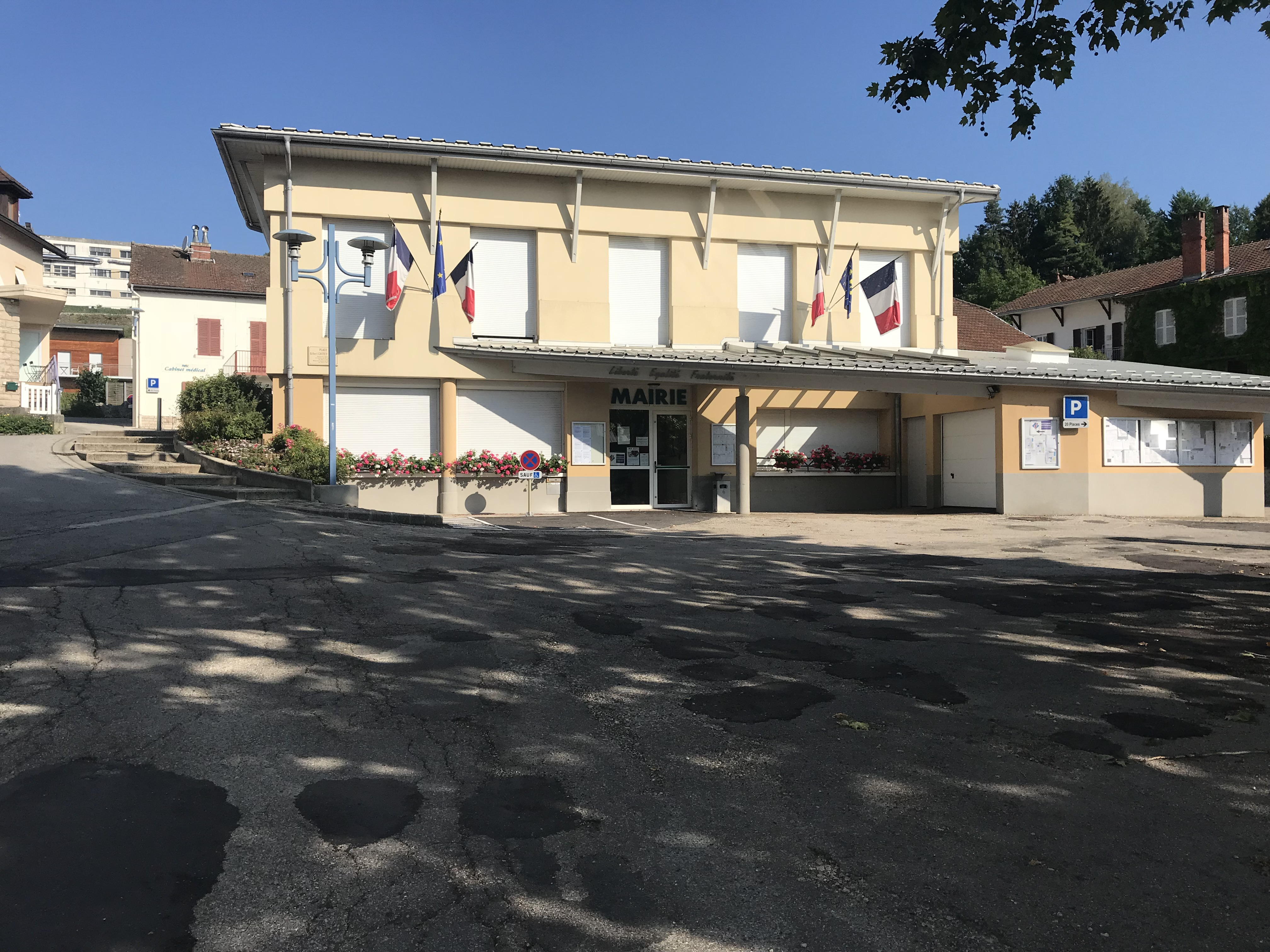 Image de Lavans-lès-Saint-Claude, Jura, France en juillet 2018.